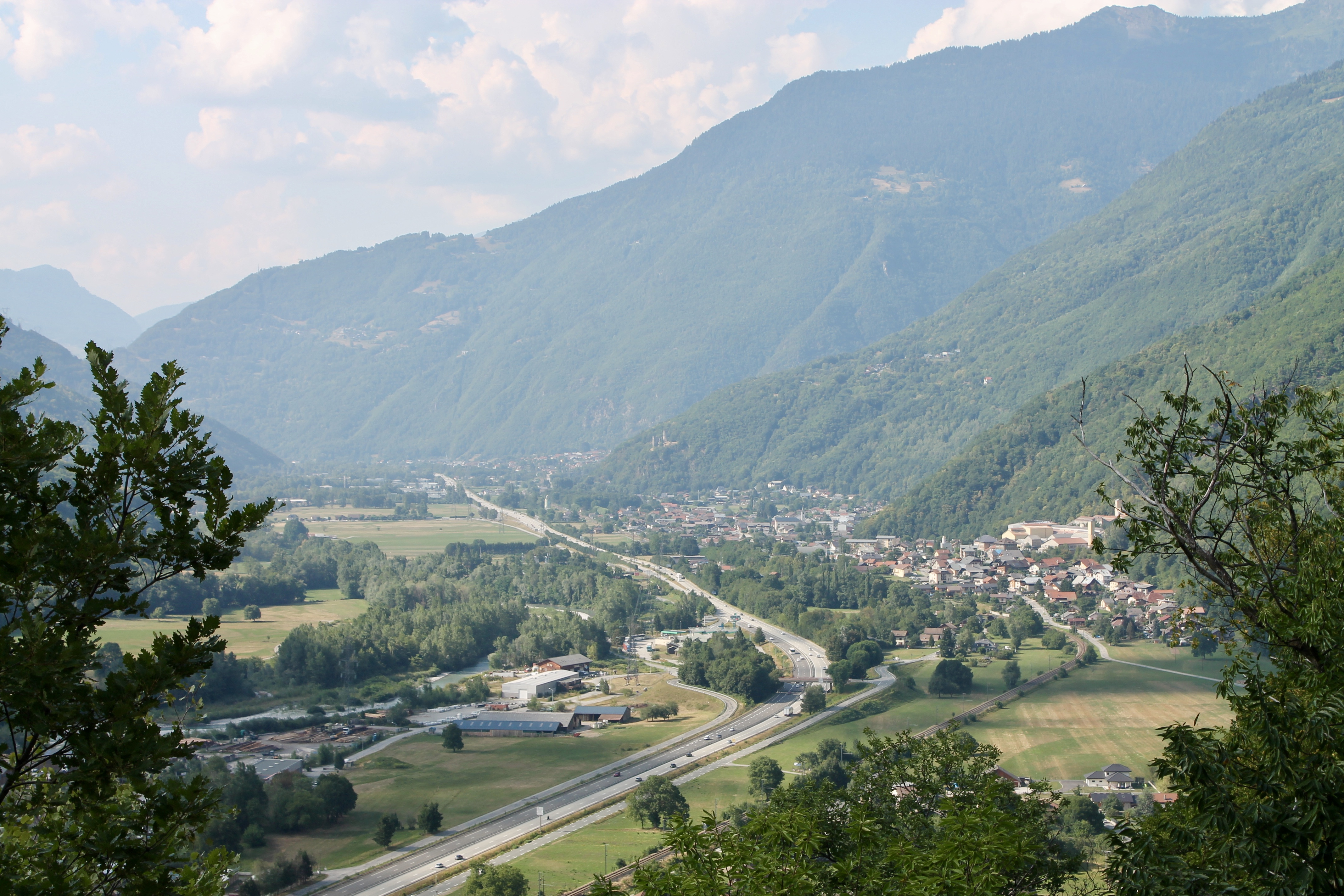 Vue de La Bâthie depuis Notre-Dame-des-Neiges (juillet 2018)